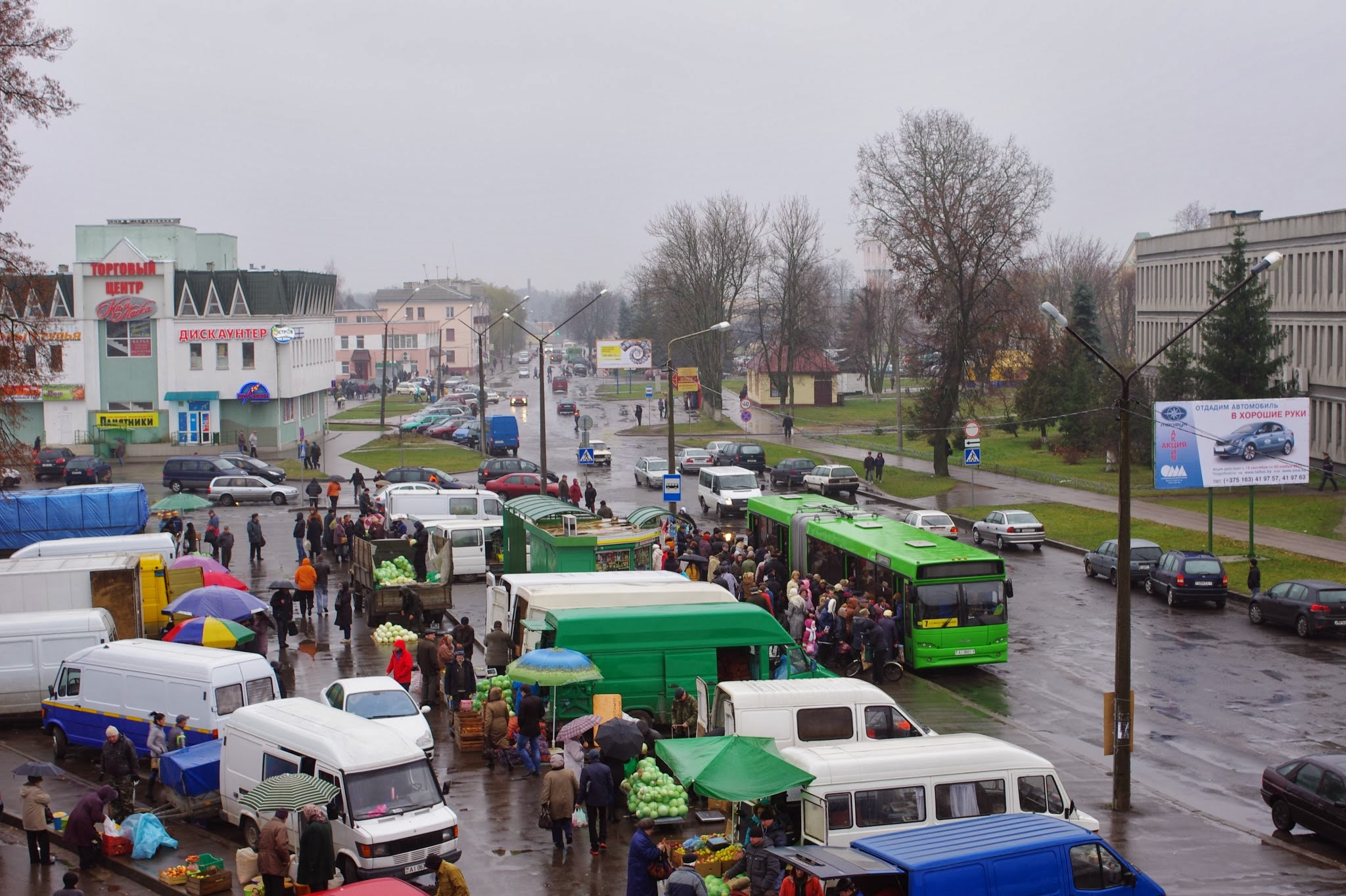 Baranovichi, Belarus